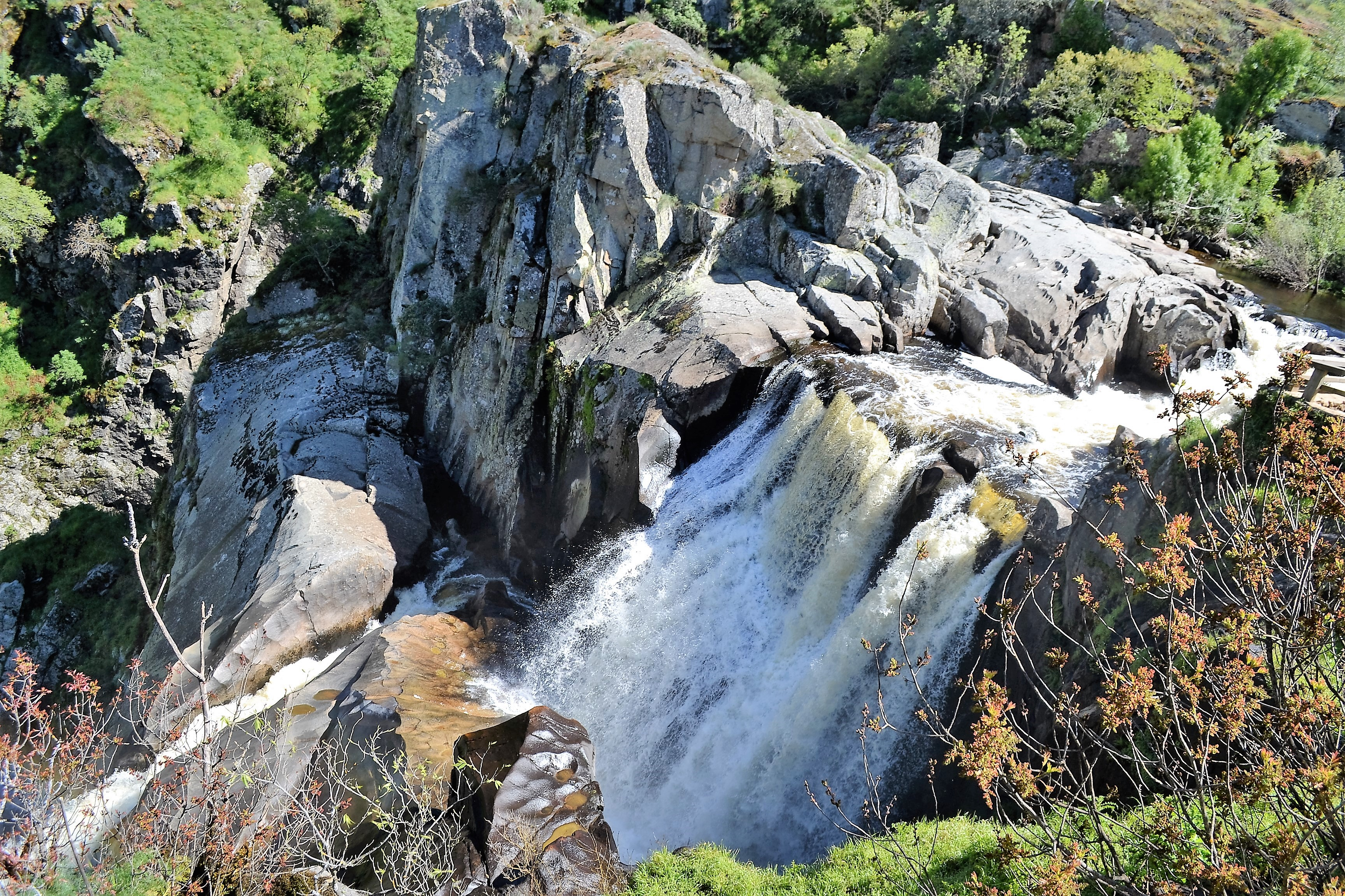 Arribes del Duero This is a photography of a Special Area of Conservation in Spain with the ID: ES4150096. Natura2000 entry, EEA entry